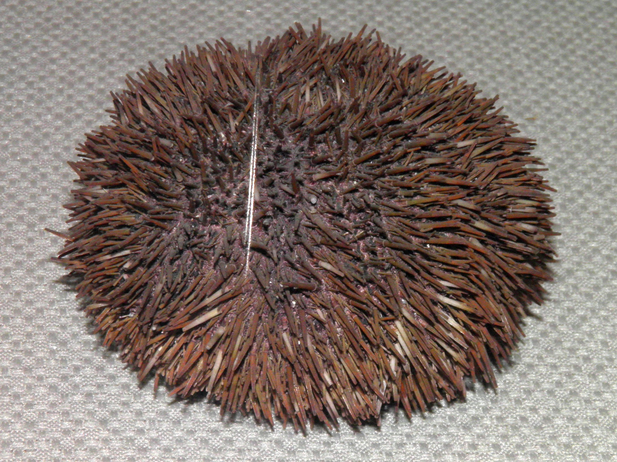 Strongylocentrotus intermedius в Научном музее ДВФУ (г. Владивосток)